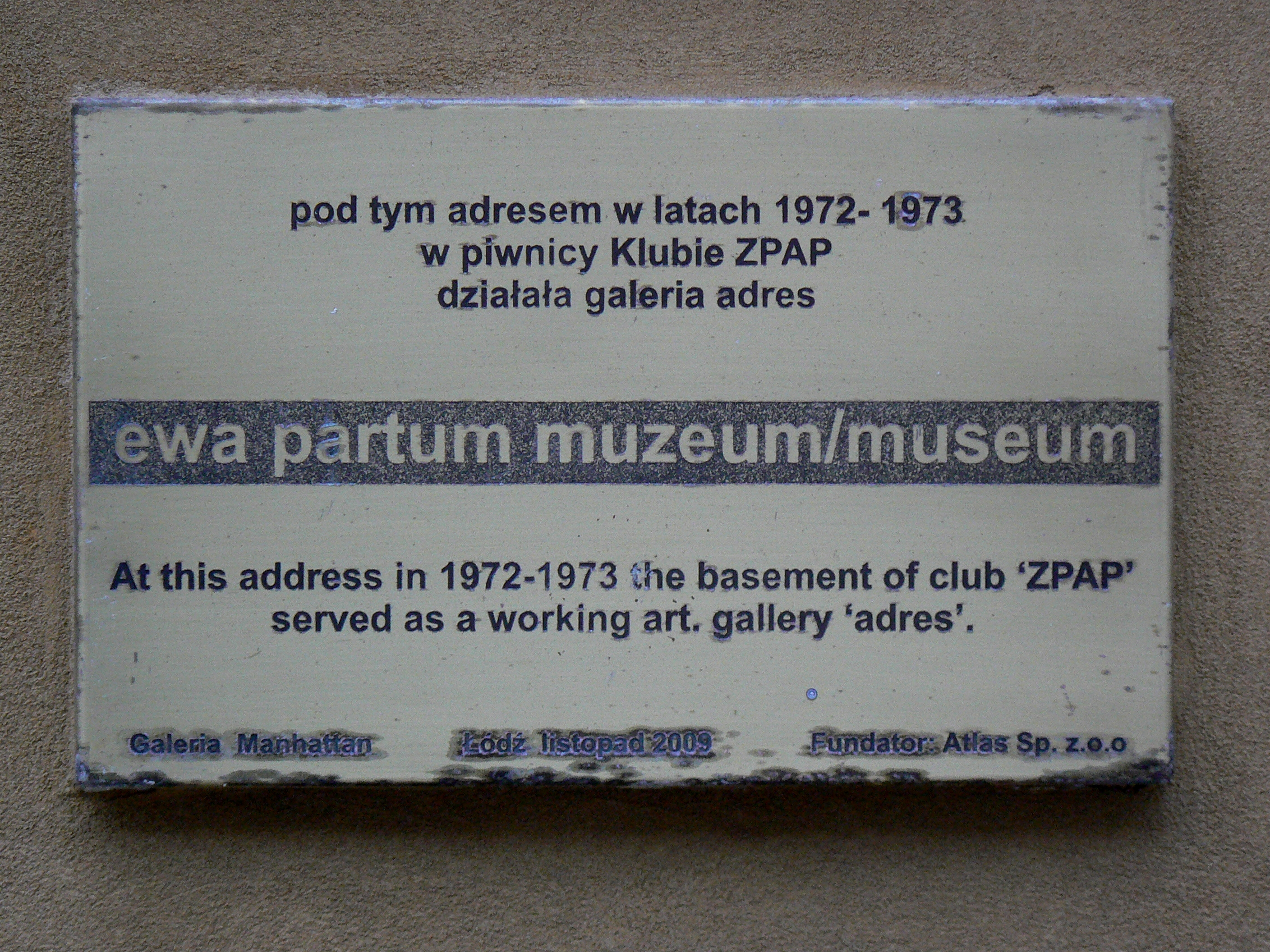 Tablica na budynku przy Piotrkowskiej 86 w Łodzi (Kamienica pod Gutenbergiem).